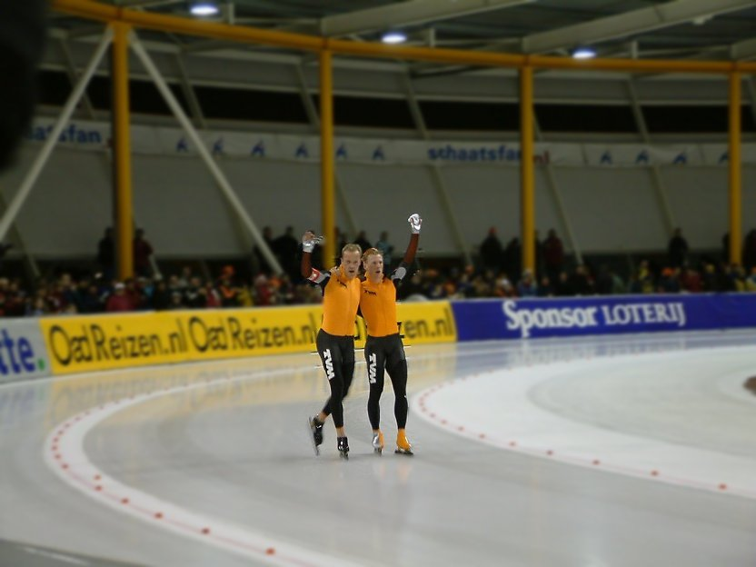 Verheijen en Uitdehaaghe tijdens het NL allround 2004 in het IJssportcentrum in Eindhoven